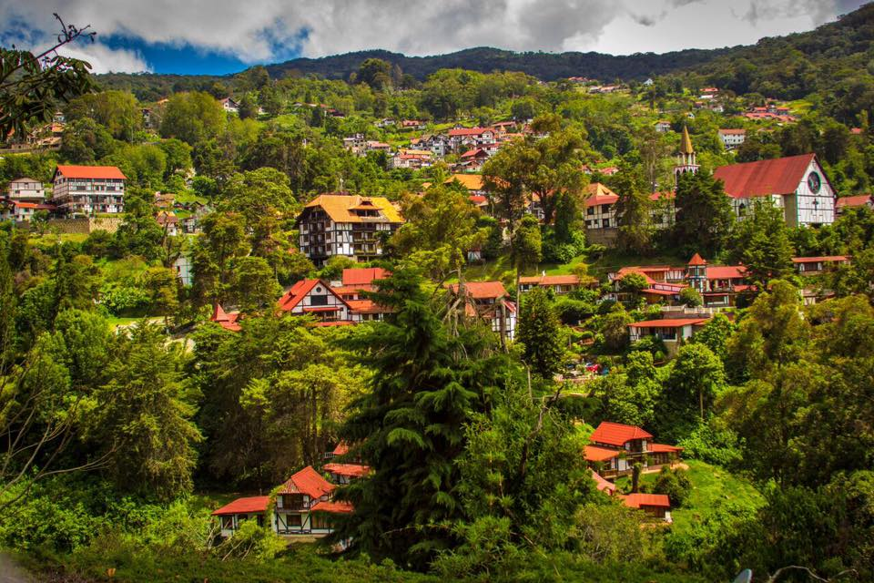 Colonia Tovar-paisaje de montañas